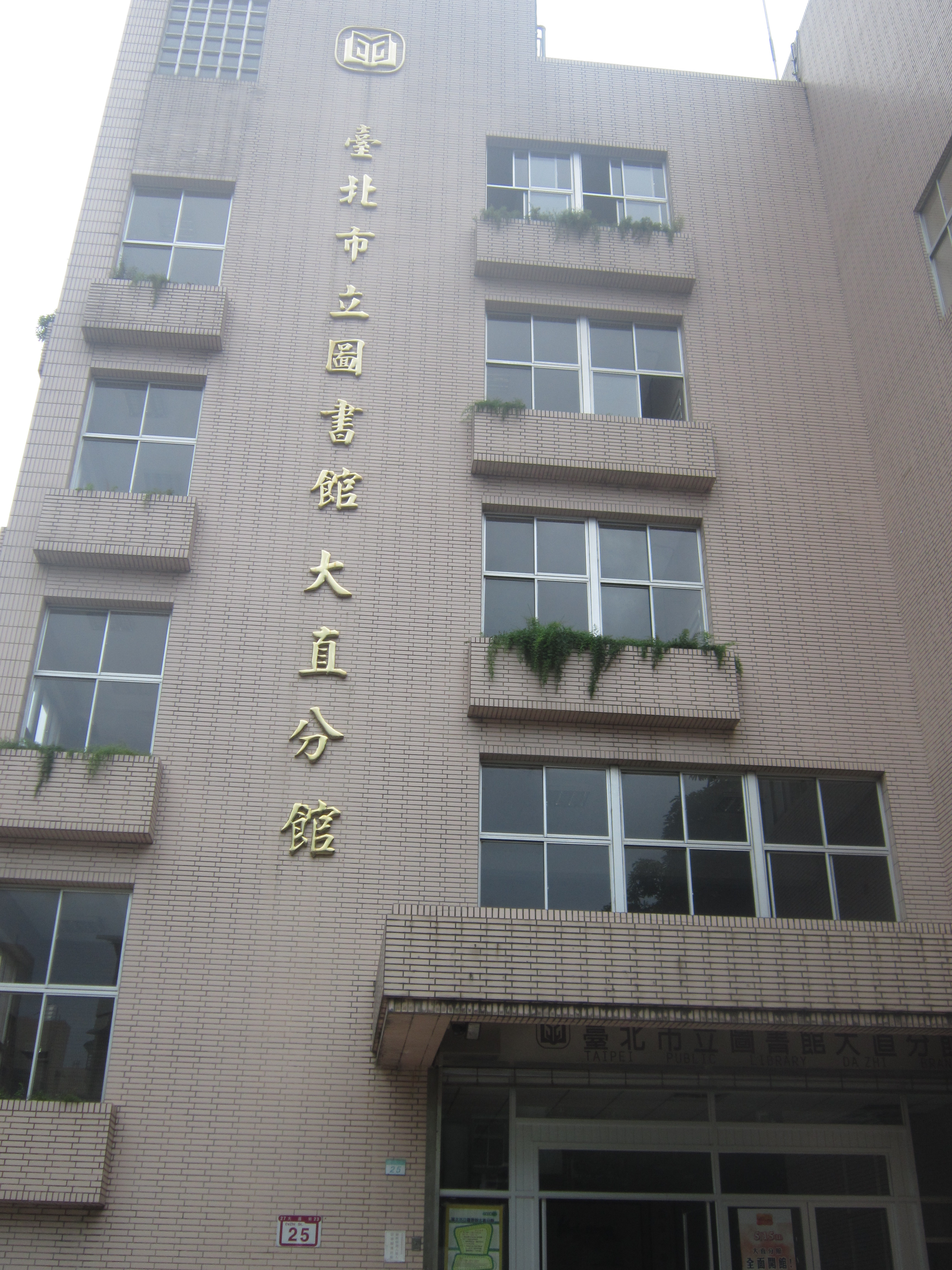 臺北市立圖書館大直分館，位於臺北市中山區大直街25號3至5樓。